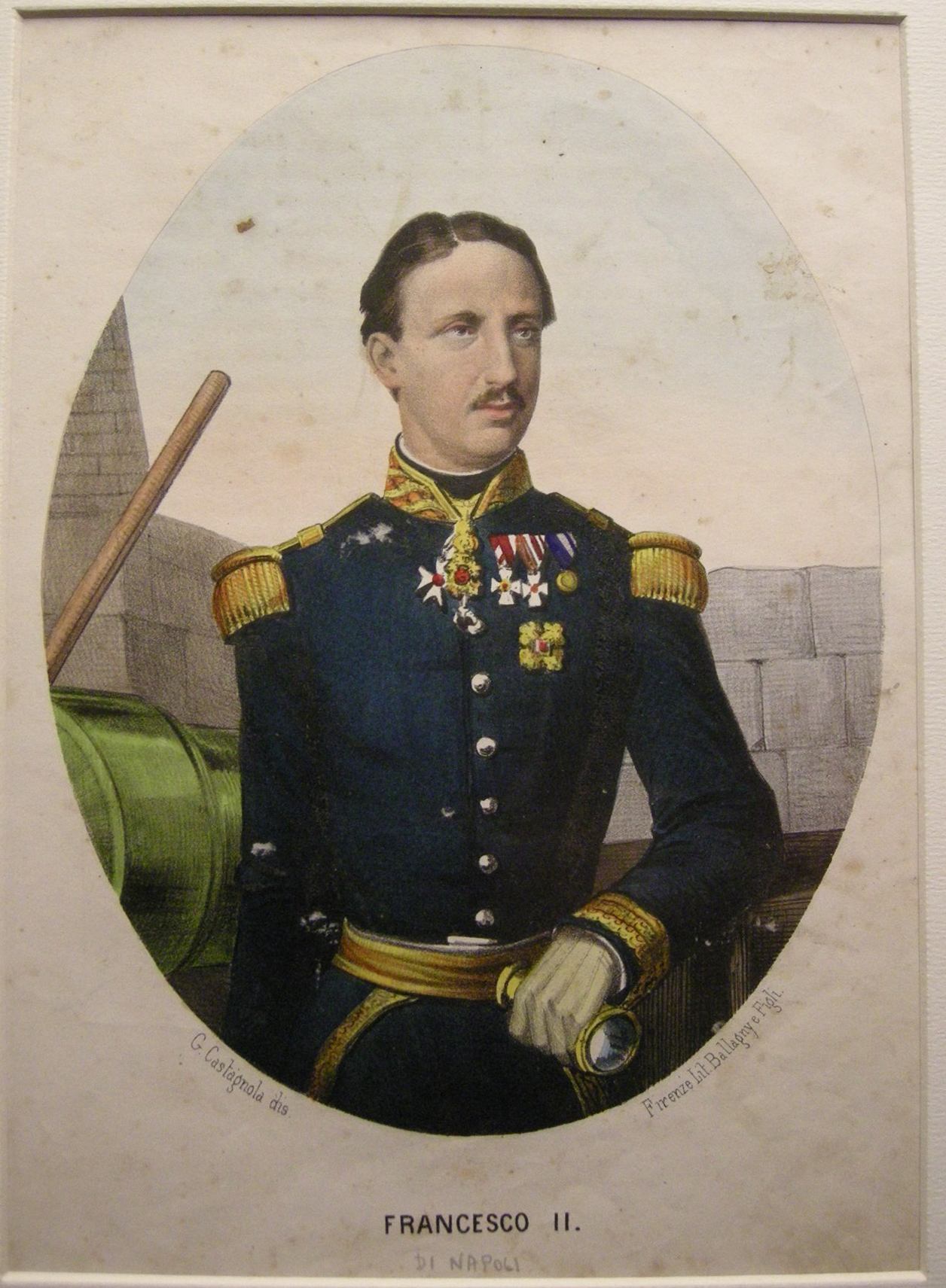 Litografia ballagny, fine XIX sec. francesco II di napoli